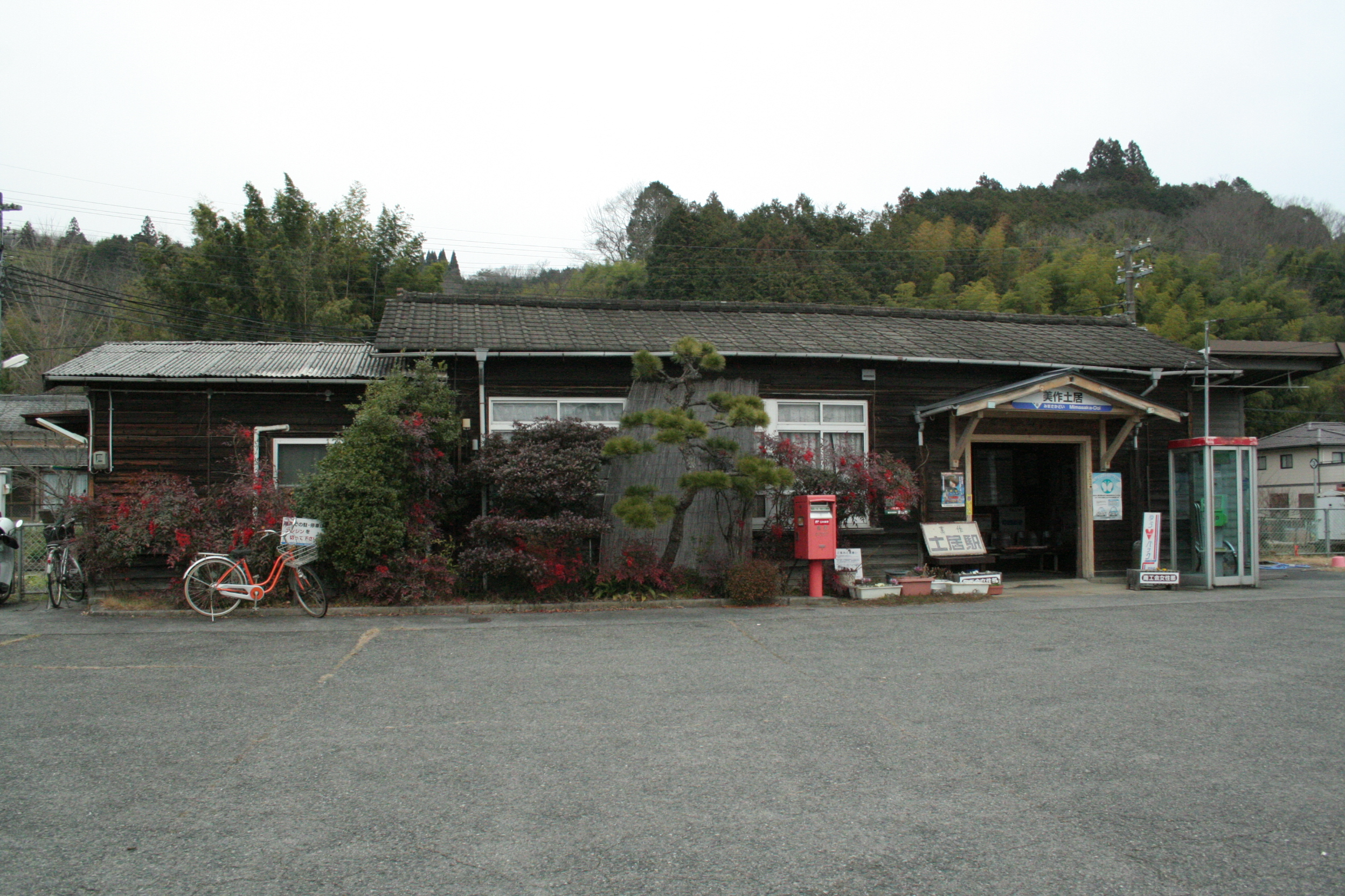 岡山県美作市土居のJR西日本姫新線の駅である美作土居駅。